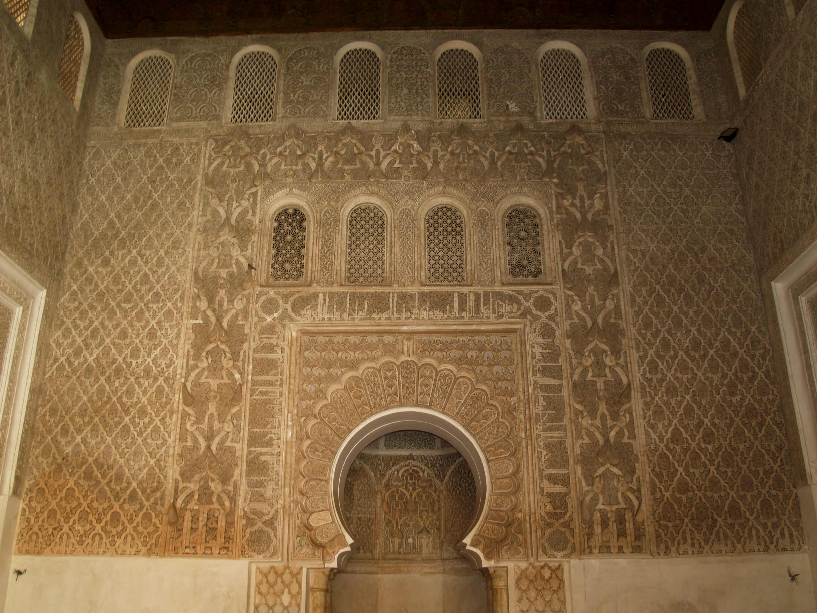 Marrakech. Madrasa ben Yusuf. Mezquita.